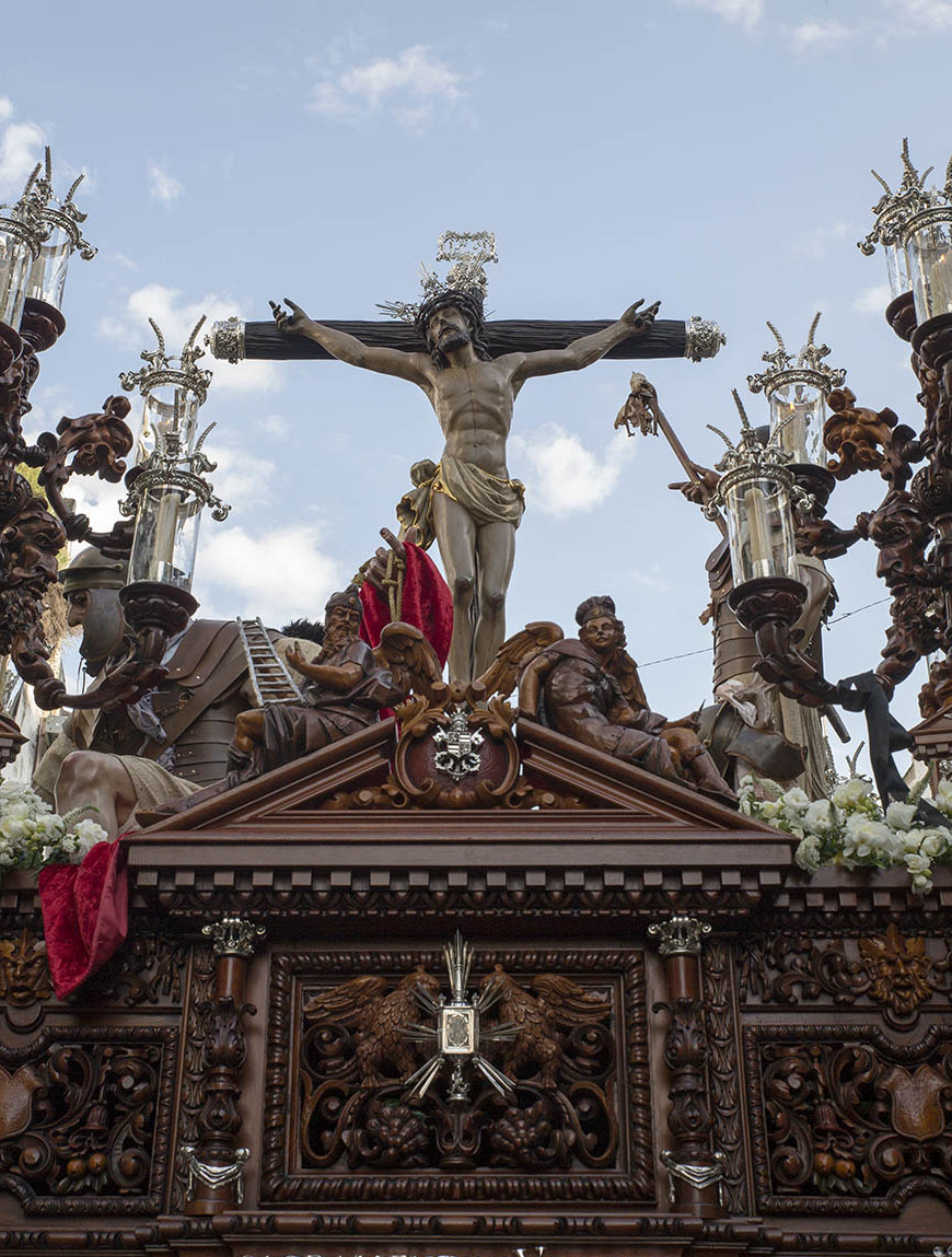 Santísimo Cristo de La Agonía